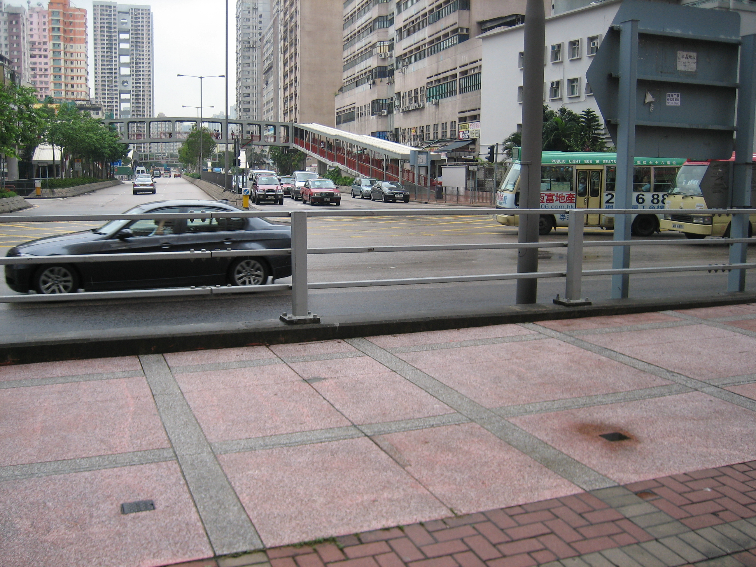 大涌道